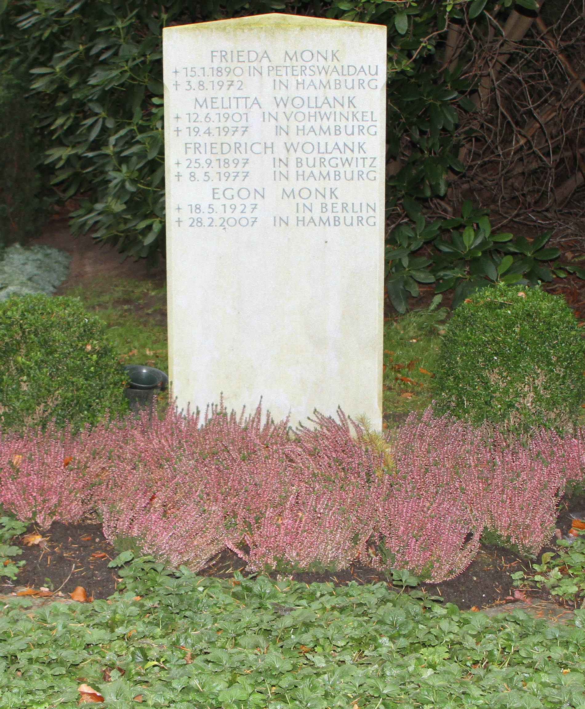 Egon Monk (* 18. Mai 1927 in Berlin; † 28. Februar 2007 in Hamburg) war ein deutscher Schauspieler, Theater- und Filmregisseur, Dramaturg und Autor.